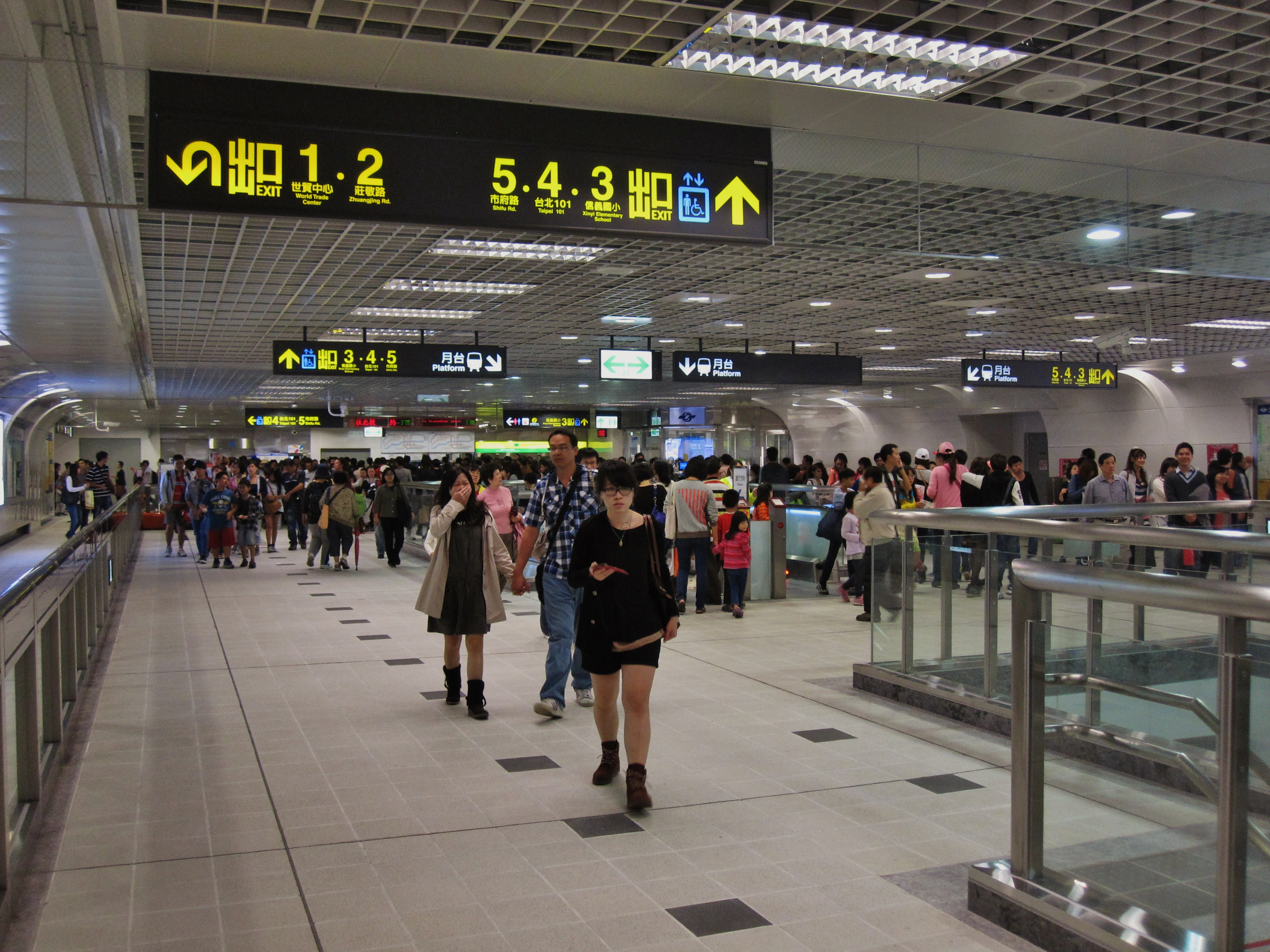 台北捷運信義線台北101/世貿站穿堂層。